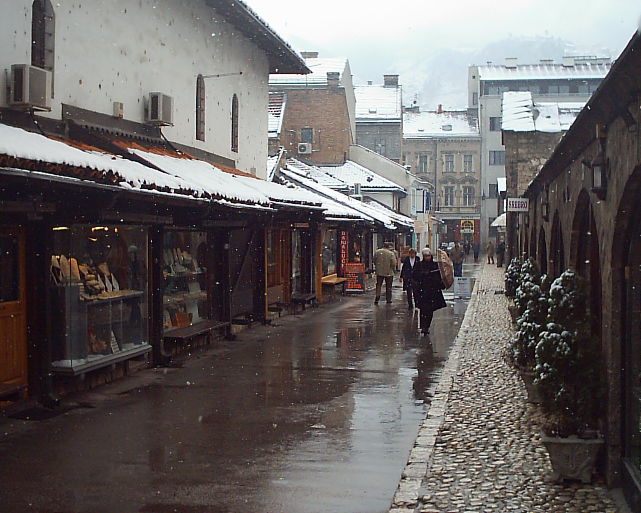 Baščaršija, Sarajevo